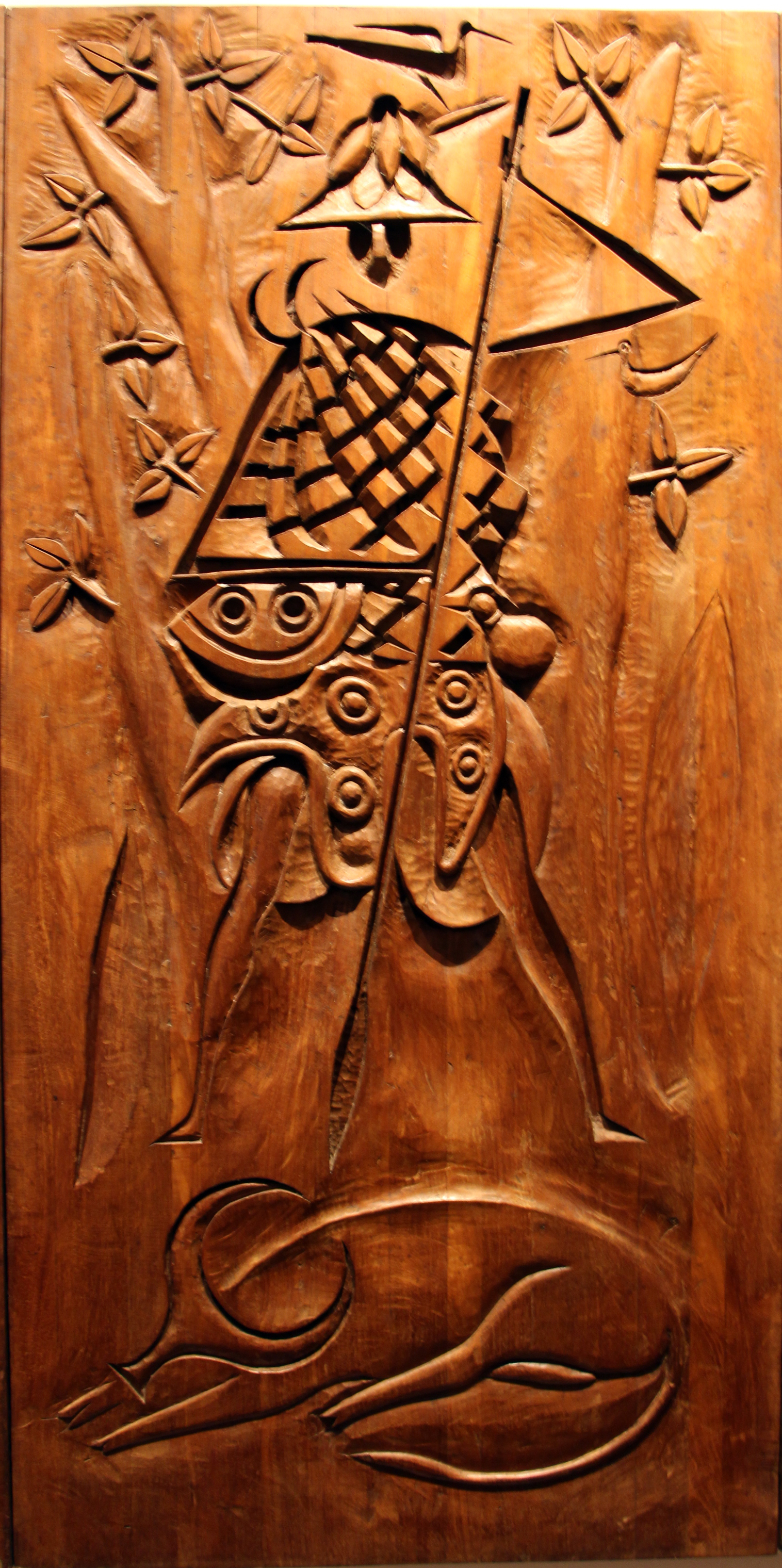 Candomblé nel Museu Afro-Brasileiro, Salvador